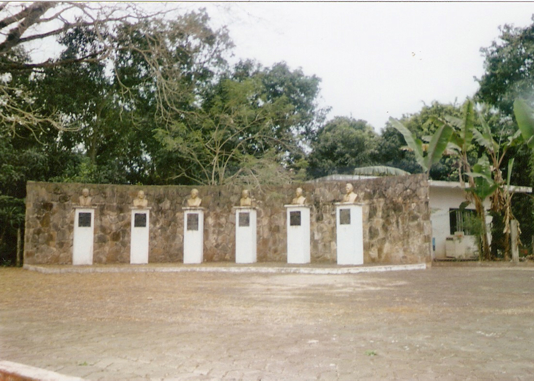 Monumento a los fundadores del municipio de Venustiano Carranza,Puebla.(Conocido como las cabezas)